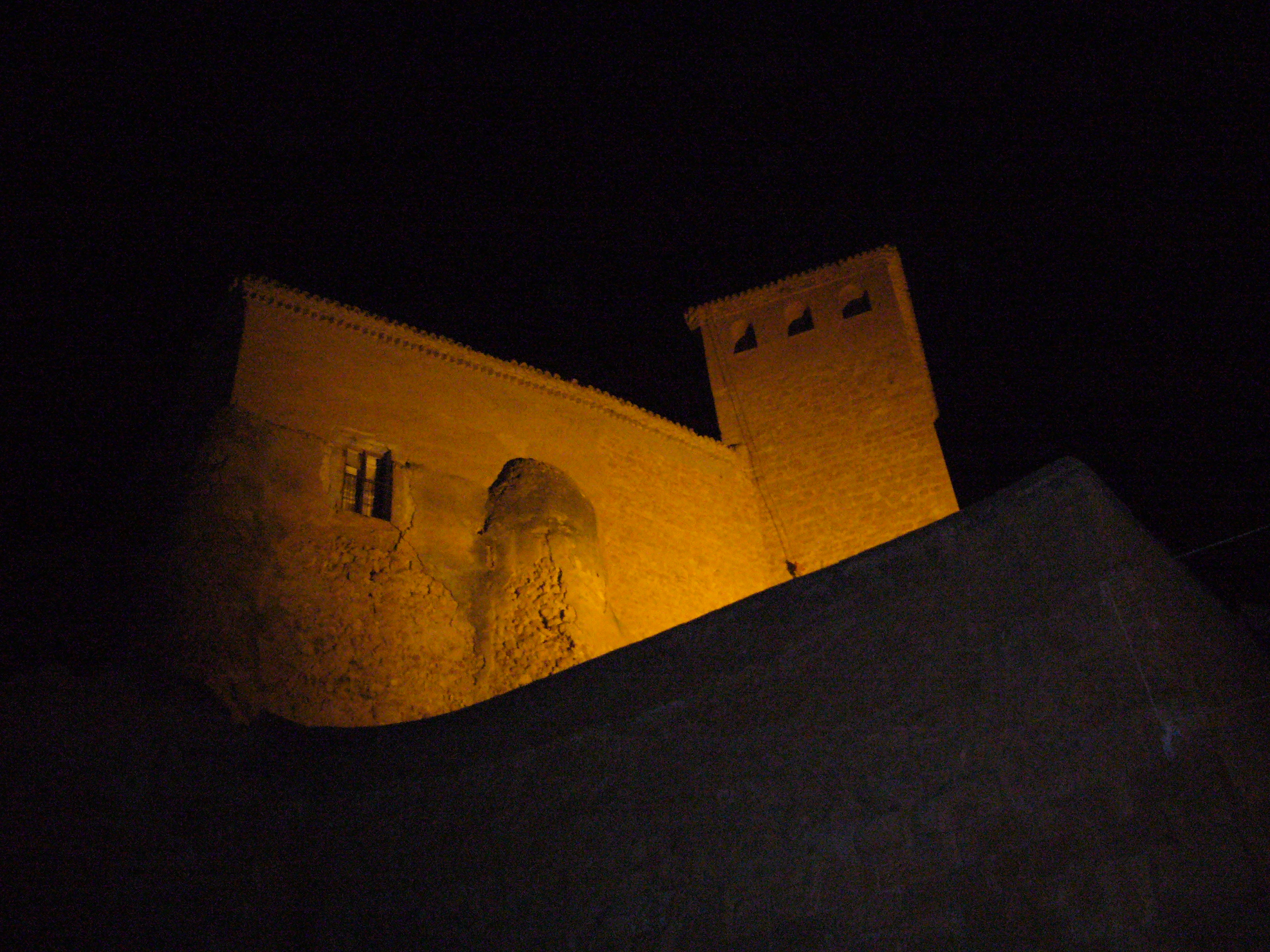 Visión nocturna del Castillo de Quevedo en Cetina